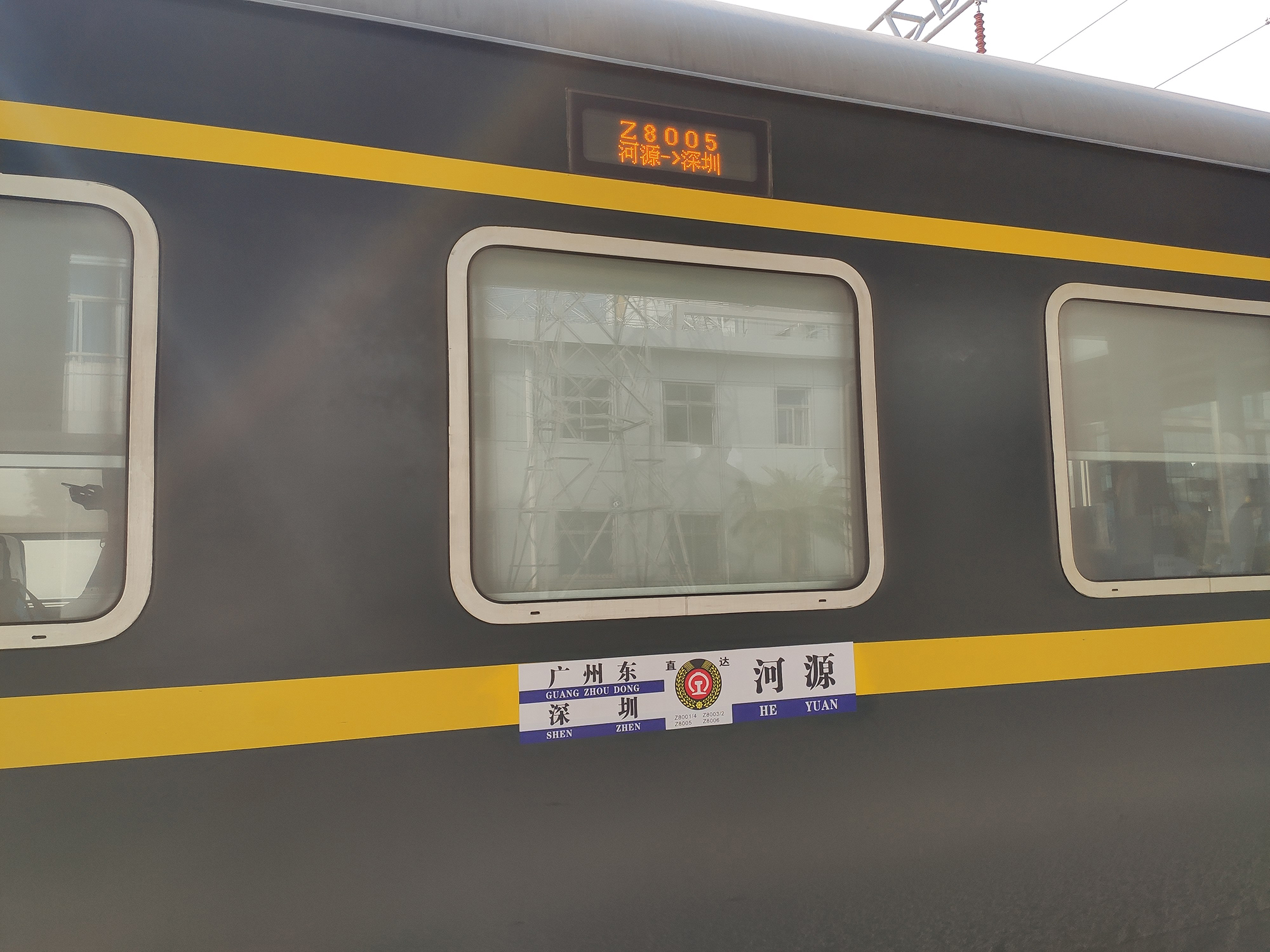 中文（中国大陆）: Z8005次LED电子水牌(20191116)